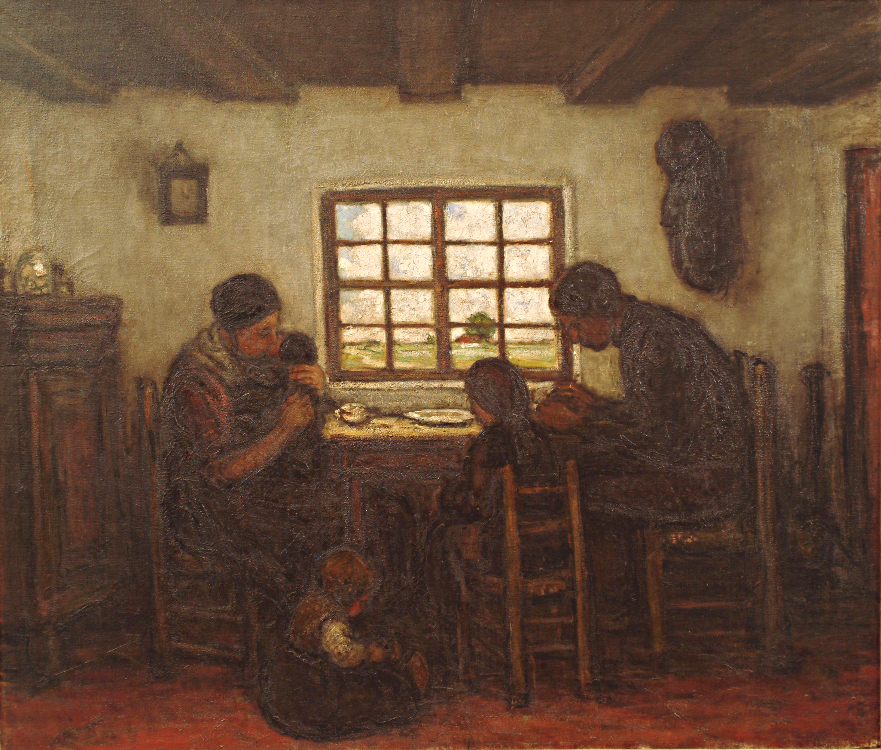 schilderij ( Jakob Smits ( Jakob Smits Museum (